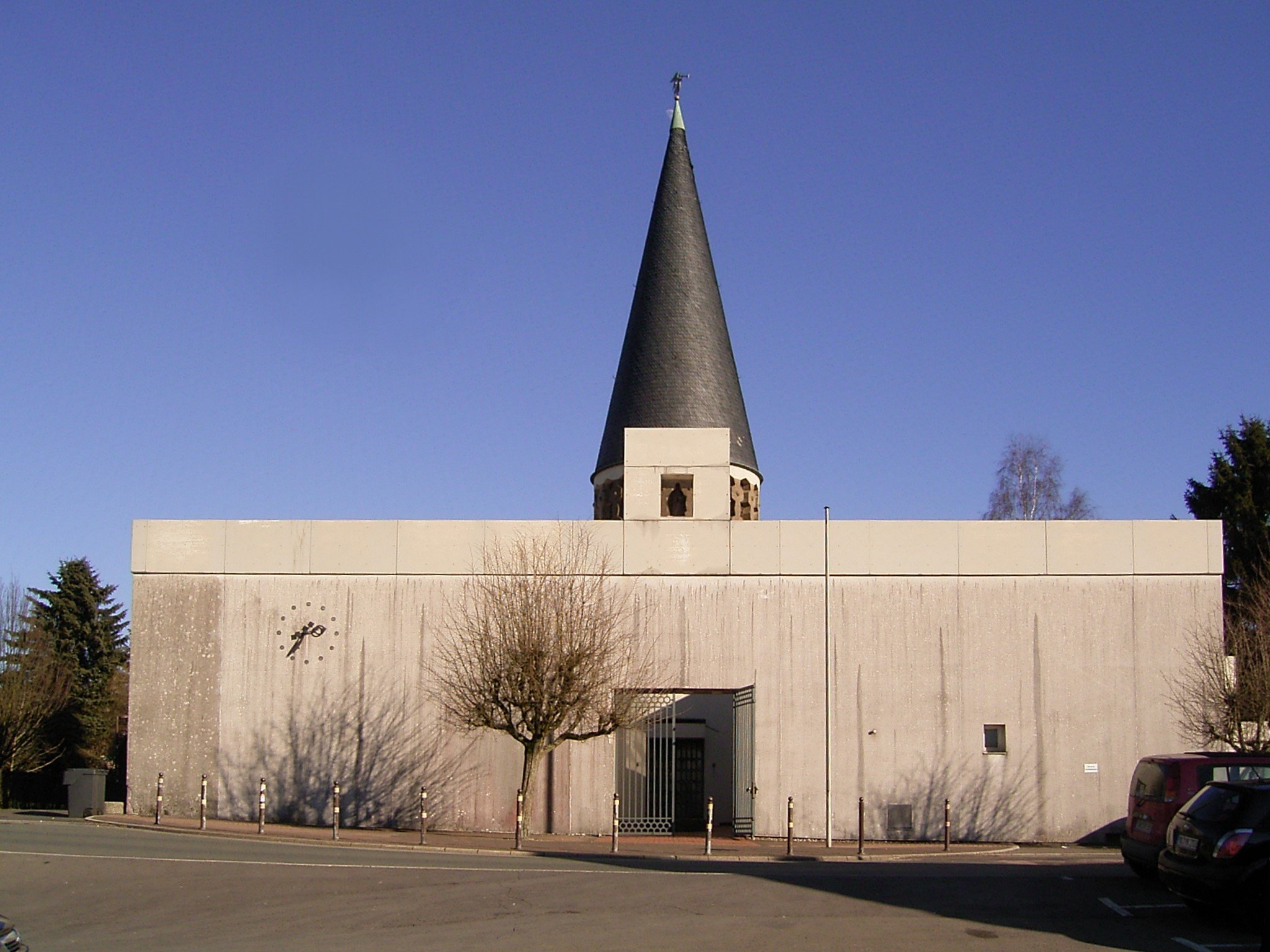 Sankt Josef Kirche in Kierspe